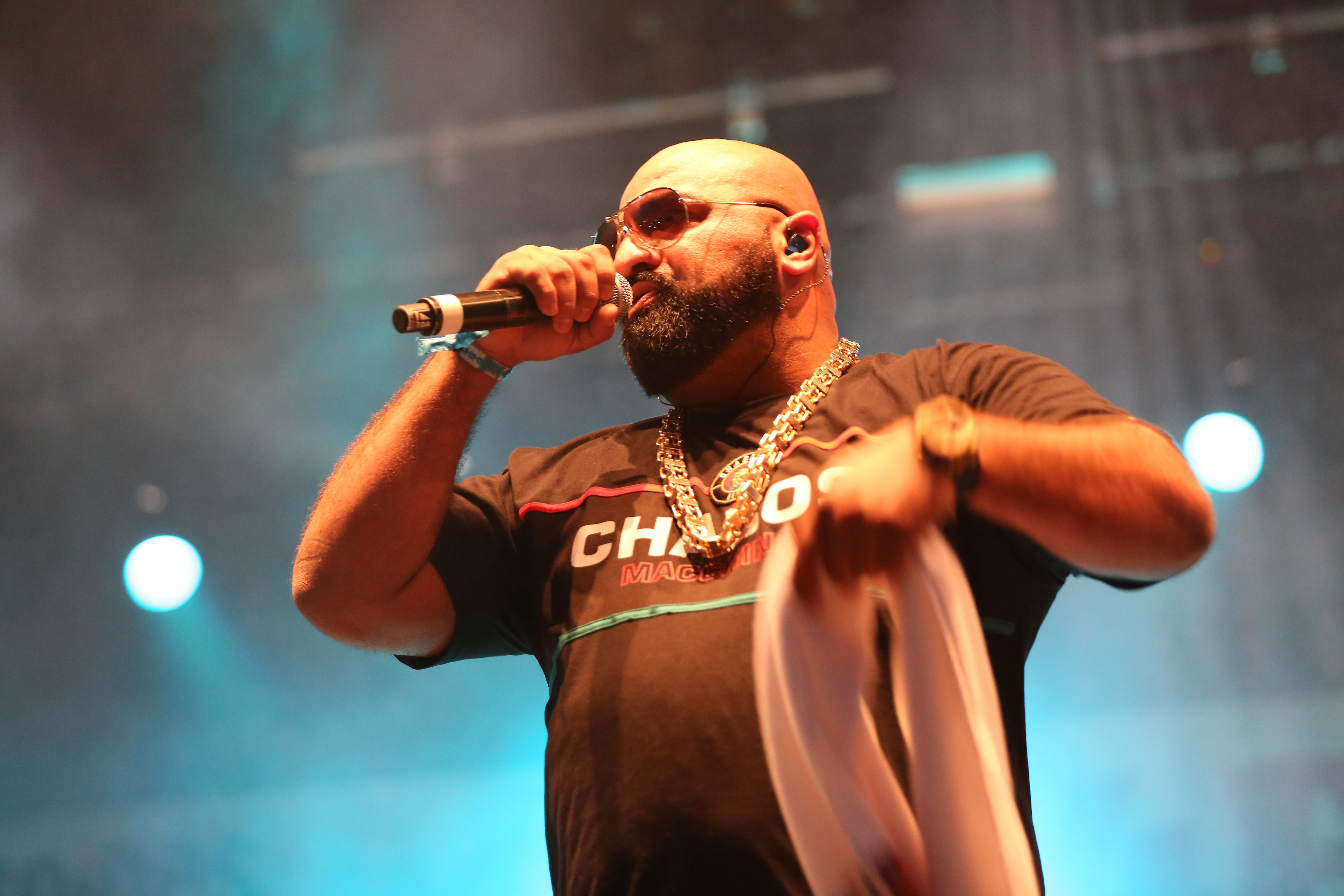 Xatar beim Out4Fame-Festival 2016